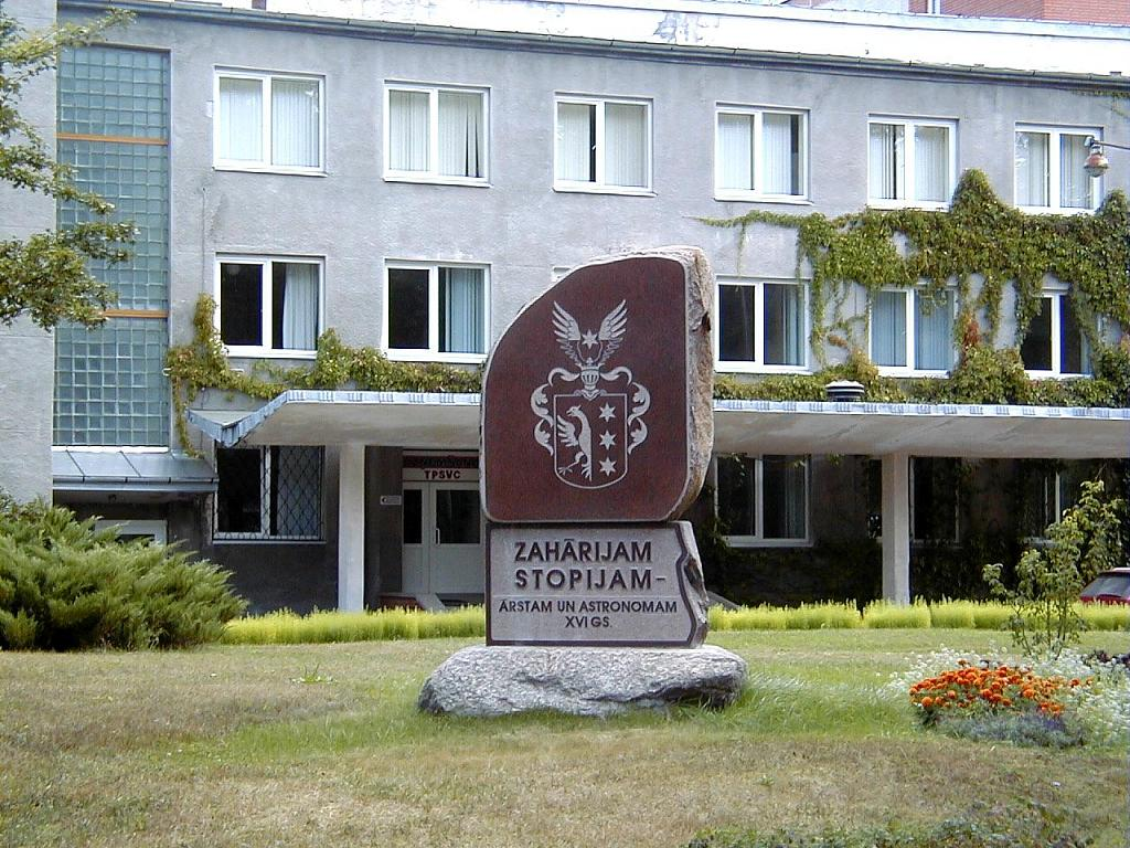 Upeslejas, Z. Stopija piemineklis. 2002-09-01